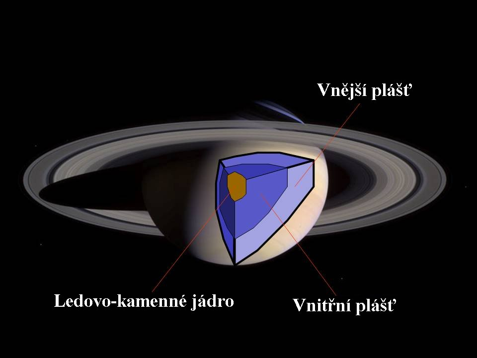 Vnitřní stavba planety Saturn. Český překlad